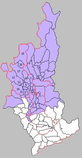 京都府葛野郡の町村制時点の町村。